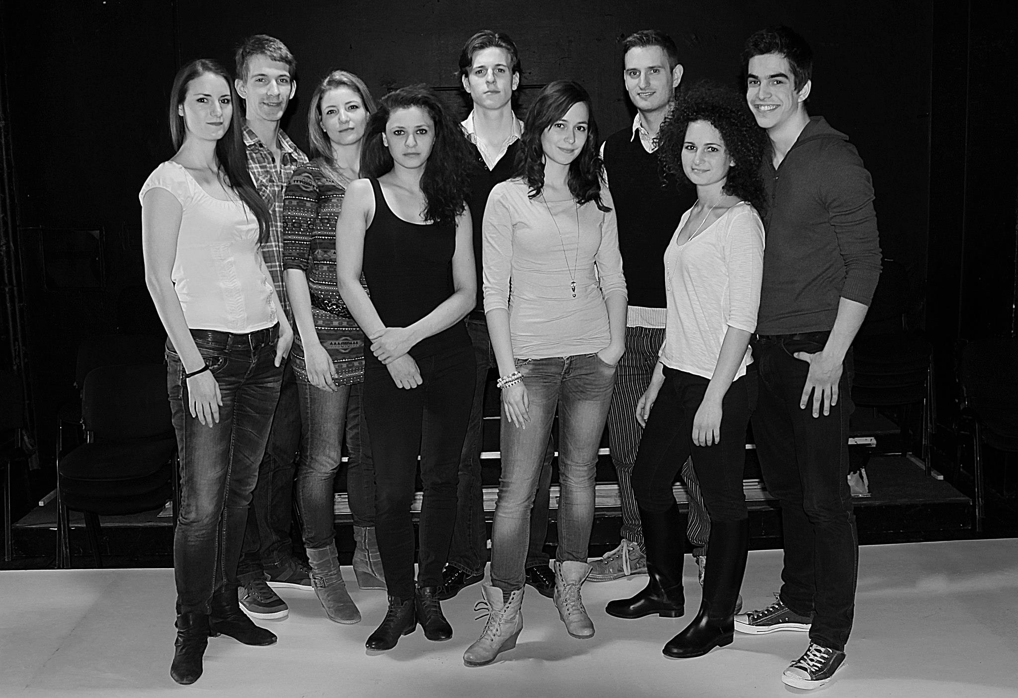 A Pesti Magyar Színiakadémia 2013-ban végzős hallgatói: Fajtai Zsófia, Vecsei László, Rácz Zsuzsanna, Kónya Renáta, Adányi Alex, Banovits Vivianne , Botlik Renátó, Kaprielian Alexa, Fekete Dániel.